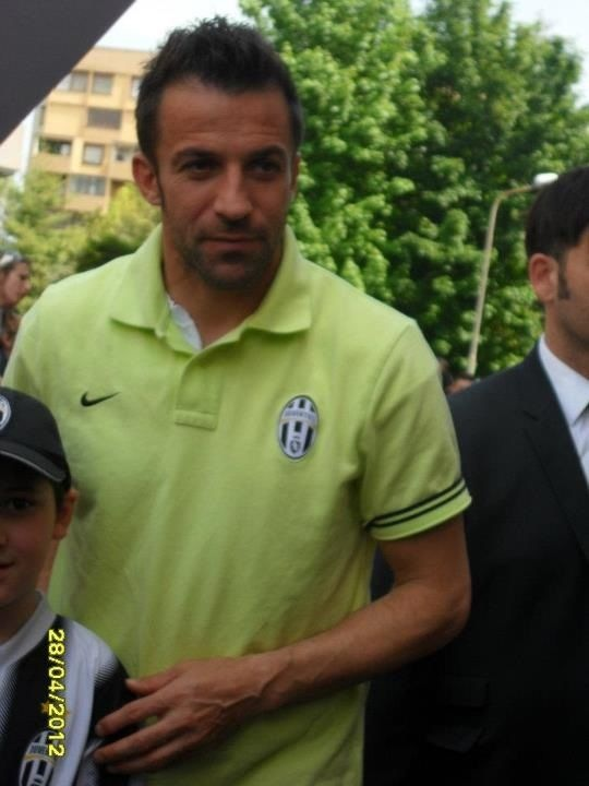 Alessandro del Piero a Novara (aprile 2012)